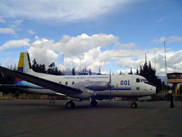 FAE648, HC-AUC y también con el 001 debido a su uso como transporte presidencial del Ecuador hasta diciembre del 2008.